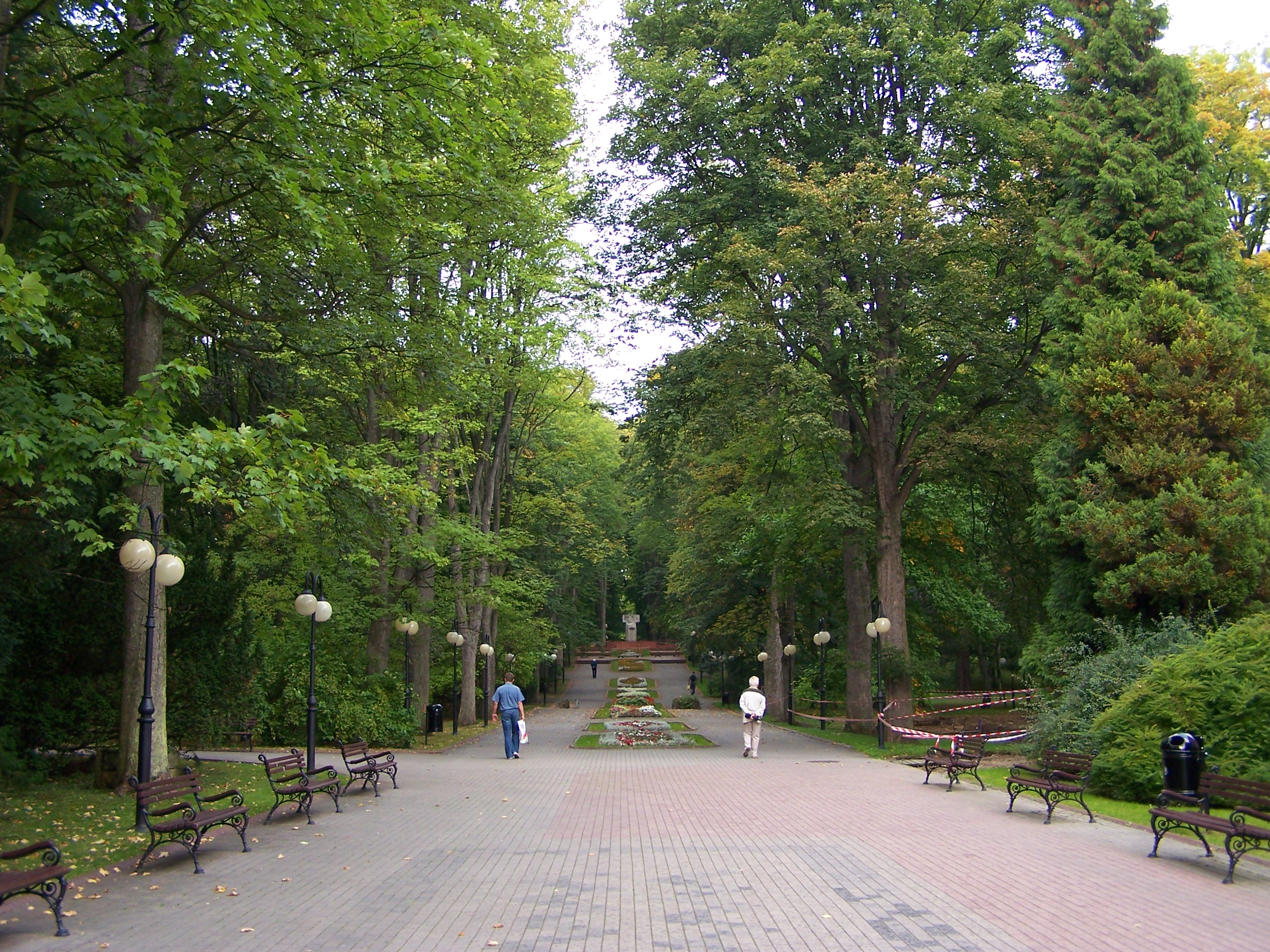 Park w Polanicy Zdrój.